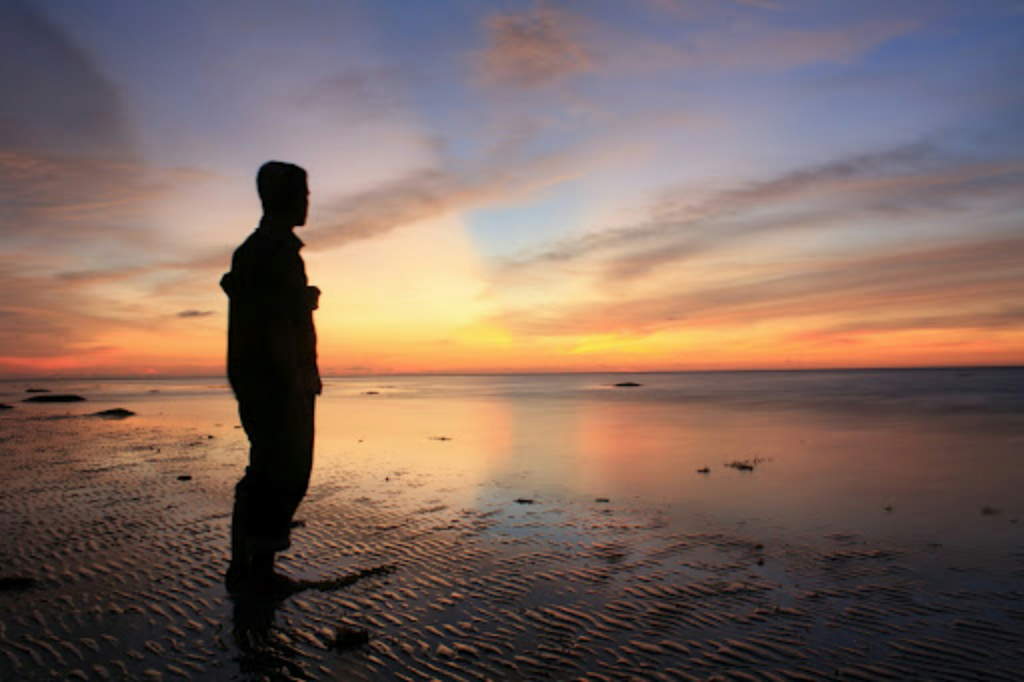 Matahari terbenam di pantai barat muara upu.